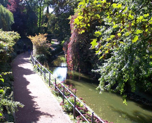 Münstersche Aa mit Aa-Seitenweg, eigenes Foto